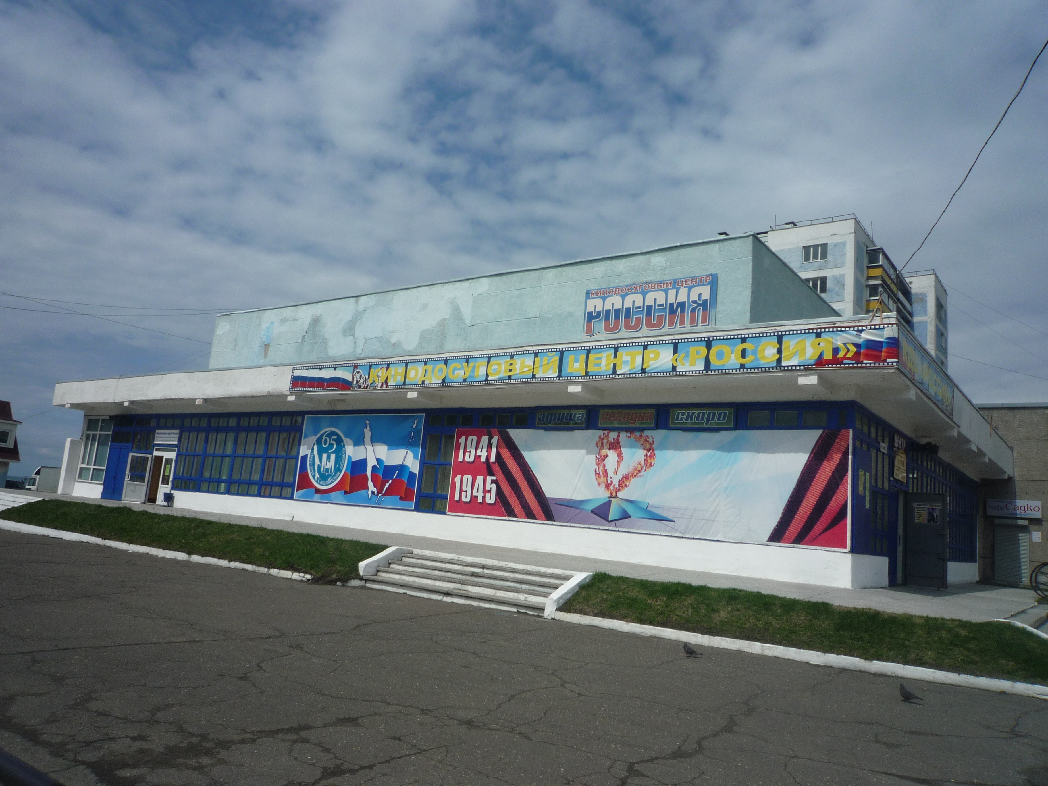 Кинотеатр «Россия» (Холмск)